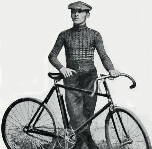 Il ciclista Eberardo Pavesi nel 1904. Da "Lo sport illustrato" n.3, 1915